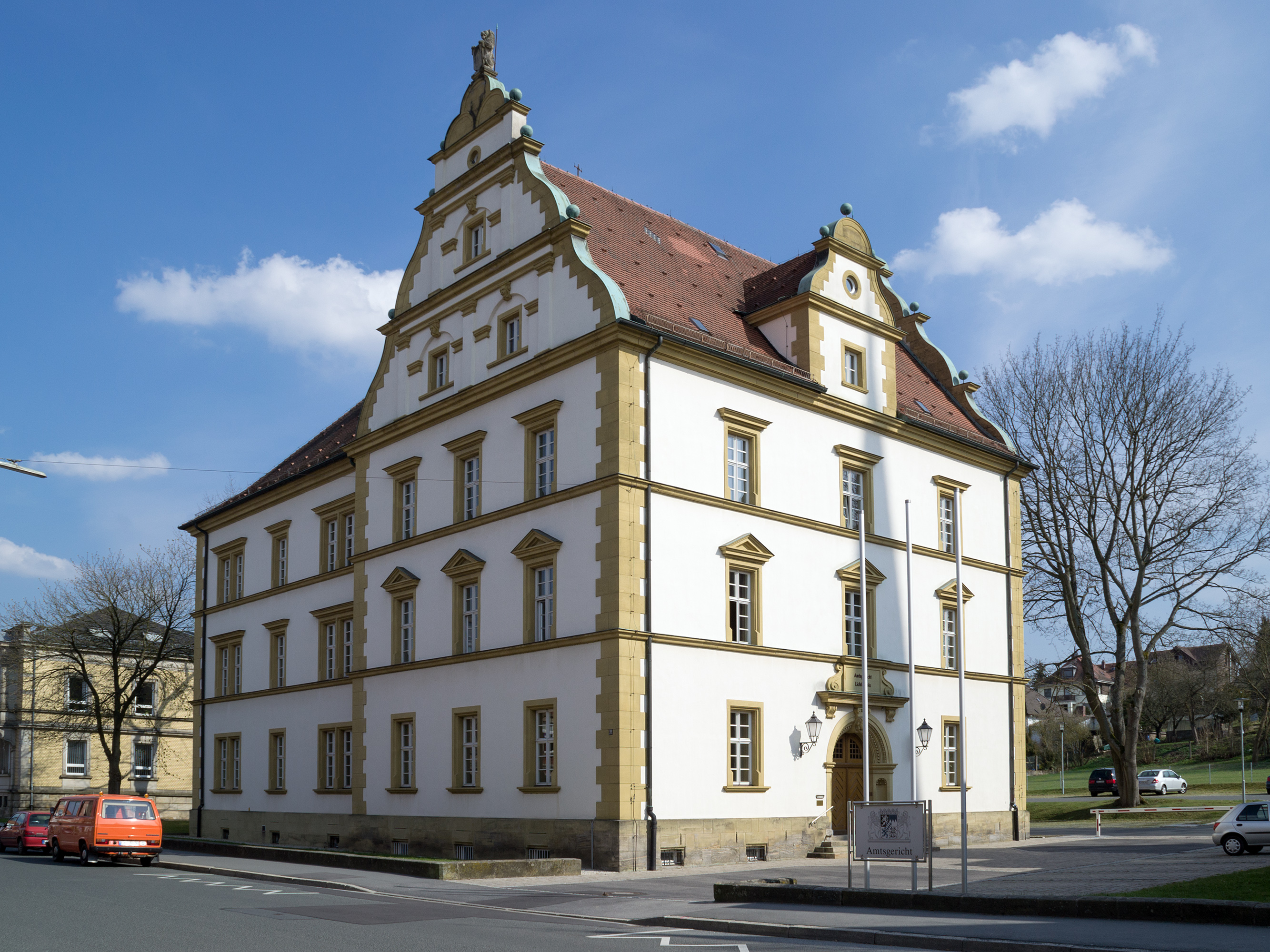 Gebäude Kronacher Straße 18 in Lichtenfels (Oberfranken), Amtsgericht This is a photograph of an architectural monument.